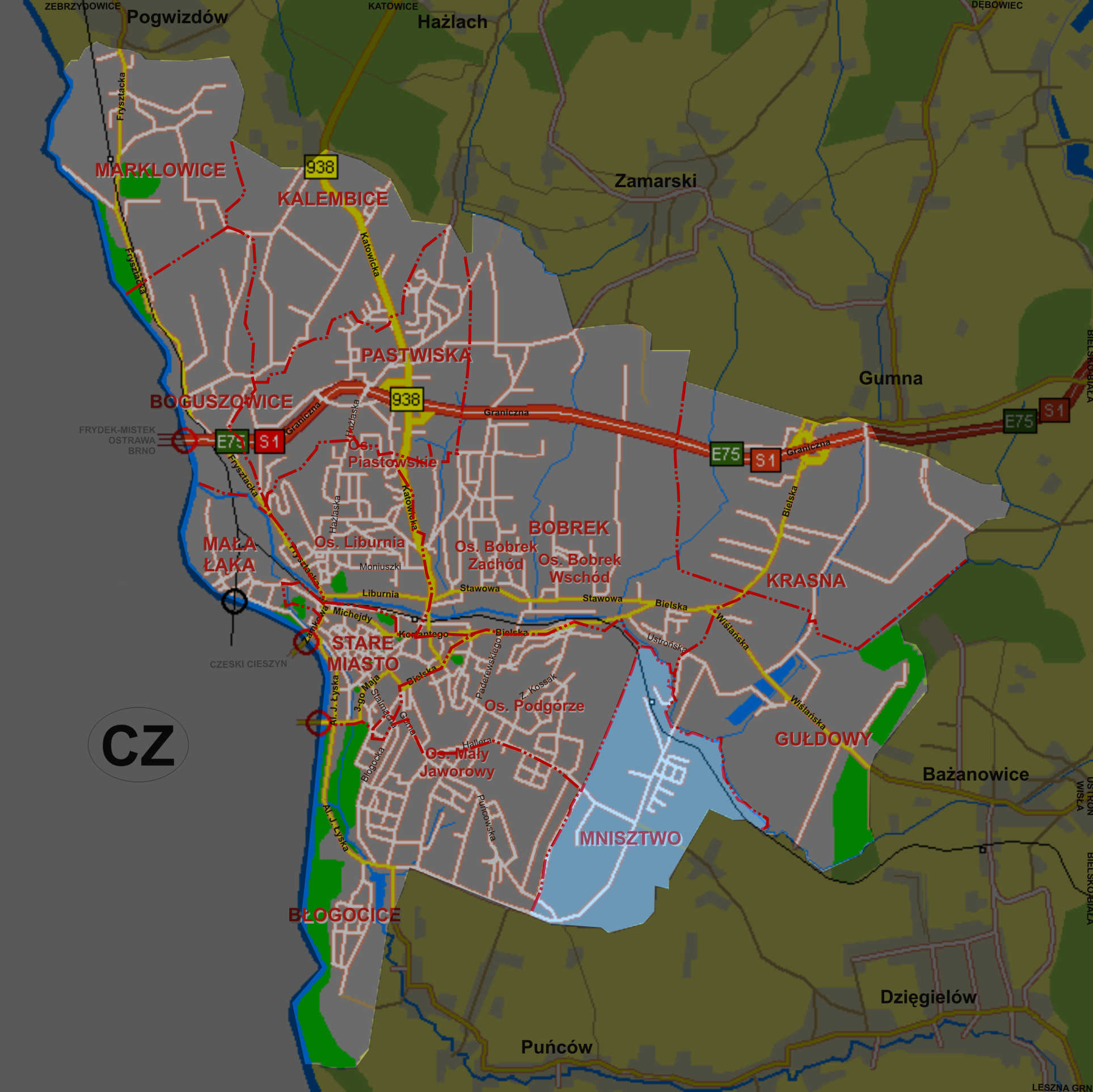 Mnisztwo, dzielnica Cieszyna